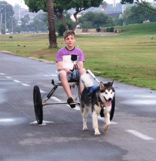 בילבו, מלמוט אלסקי מושך דופנית בפארק הירקון בתל אביב